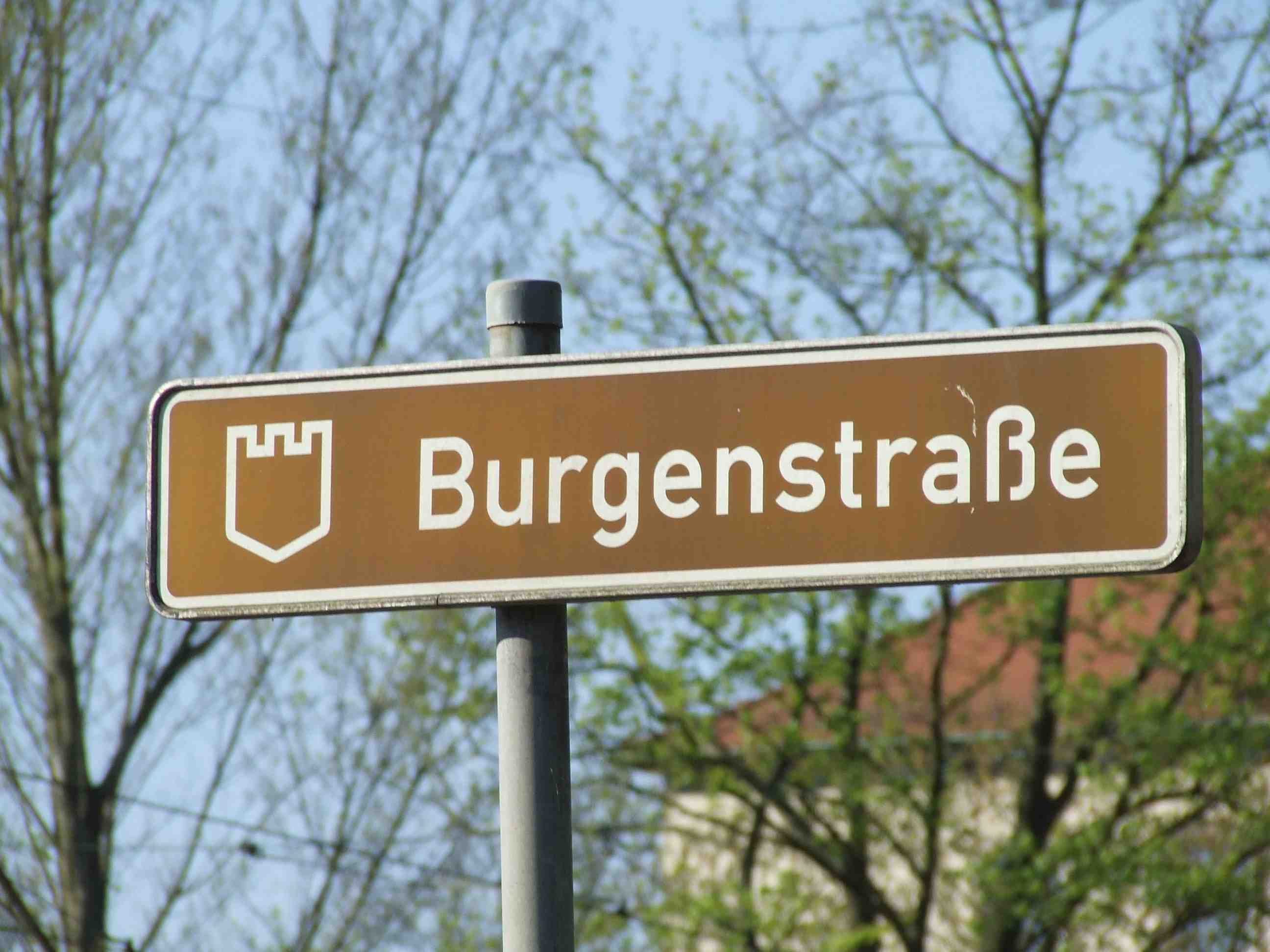 Burgenstraße hier ein Hinweisschild in Nürnberg